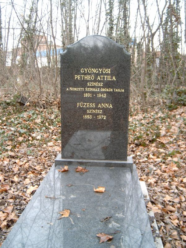 Petheő Attila (Budapest, 1891. május 11. – Budapest, 1942. május 26.) drámai színész és Füzess Anna (1893-1972) színész sírja Budapesten. Kerepesi temető: 49-1-47